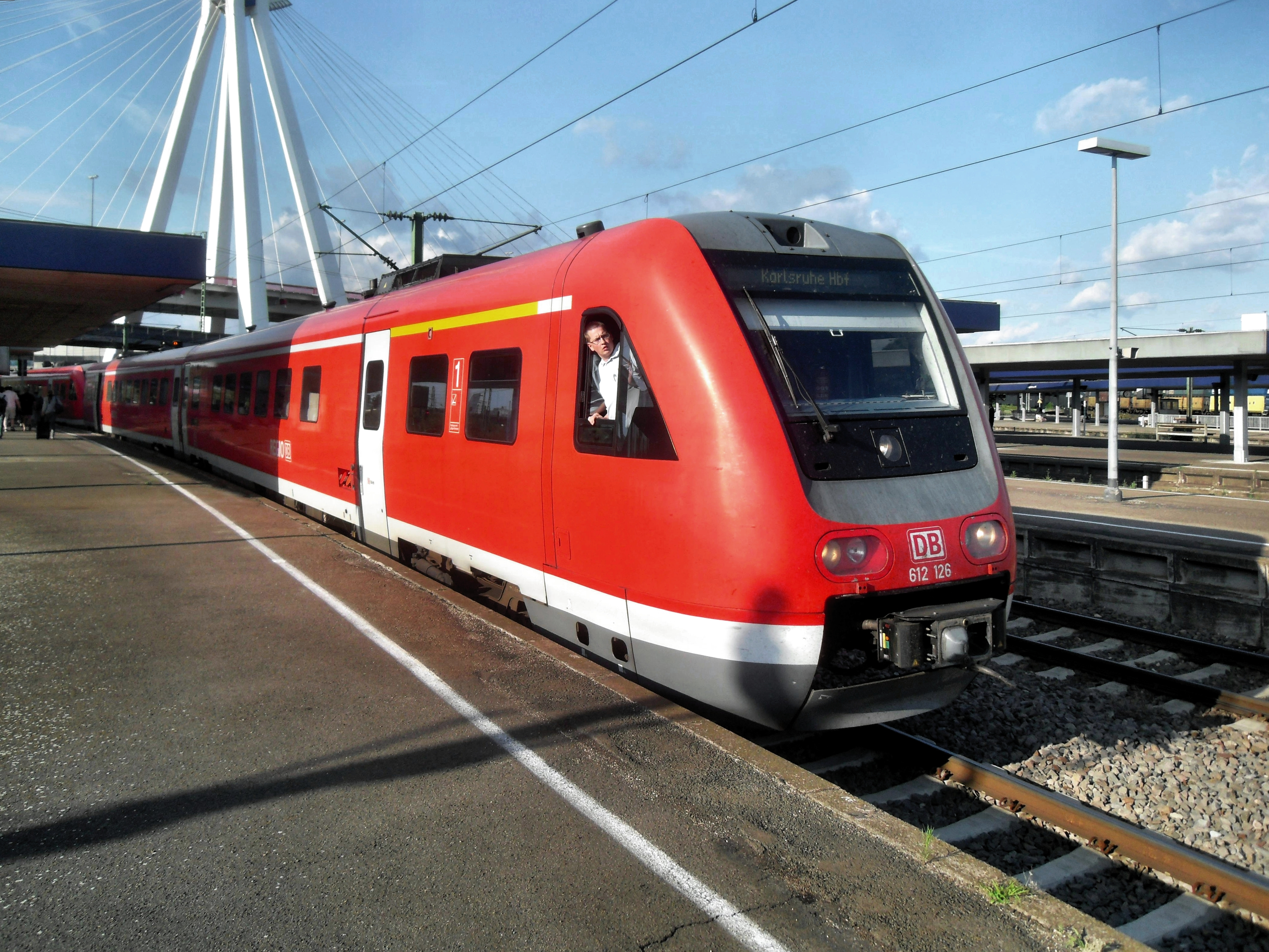 Regionalexpress der Baureihe 612 im Ludwigshafener Hauptbahnhof auf dem Weg nach Karlsruhe